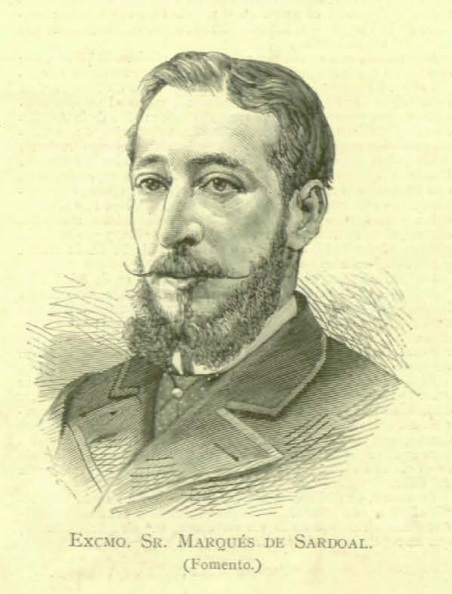 Excmo, Sr. Marqués de Sardoal (Fomento).